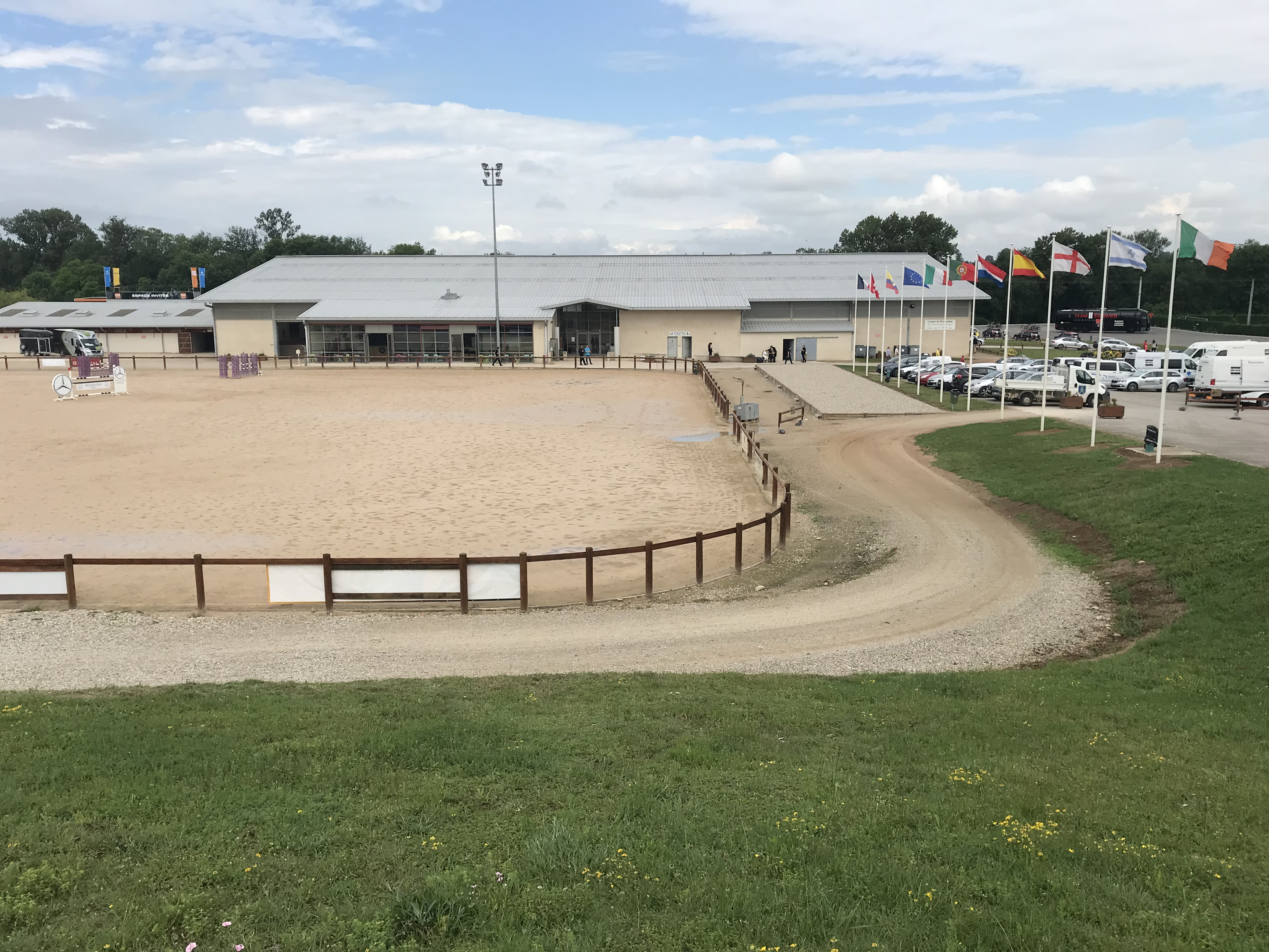 Parc du cheval de Rhône-Alpes (Chazey-sur-Ain).